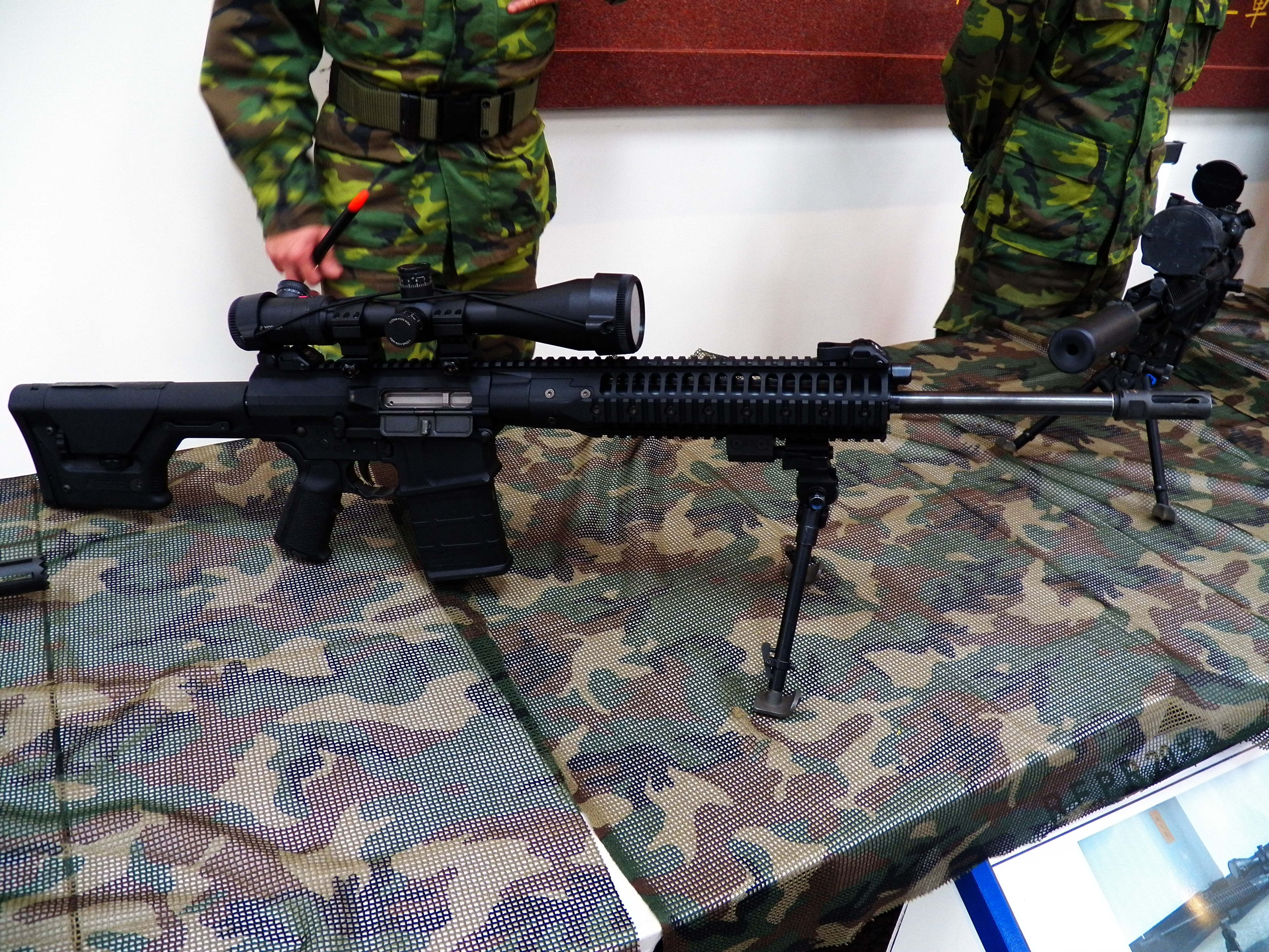 2013年裝甲兵學校營區開放活動，校史館一樓大廳西側展示的LWRC International R.E.P.R.（Rapid Engagement Precision Rifle）20 7.62mm半自動狙擊槍。